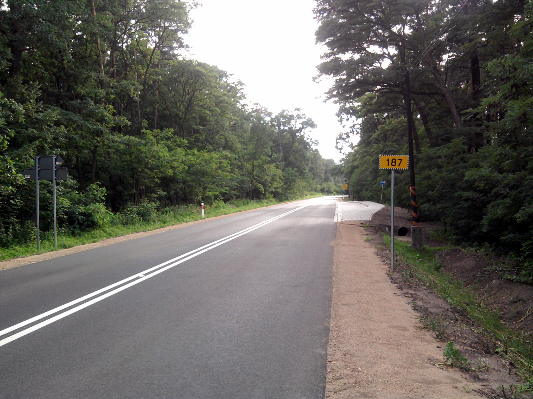 Droga wojewódzka nr 187. Zdjęcie wykonane na skrzyżowaniu z drogą powiatową prowadzącą z Buszewka do Koźla.